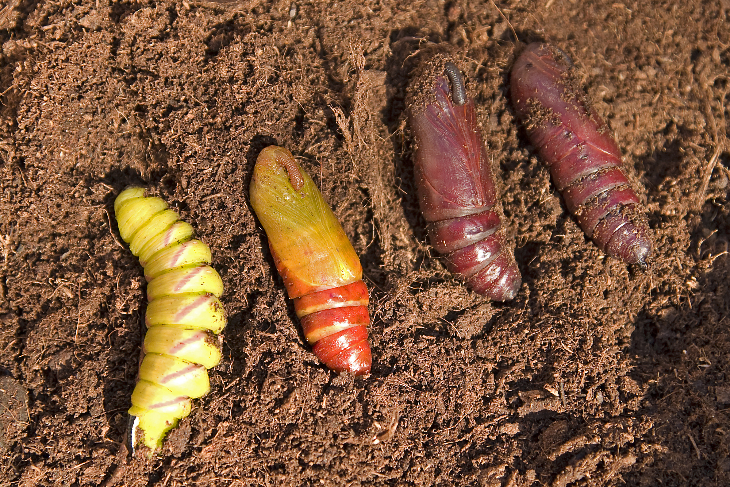 Puppen des Ligusterschwärmers in verschiedenen Entwicklungsstadien aufgenommen in 33428 Harsewinkel